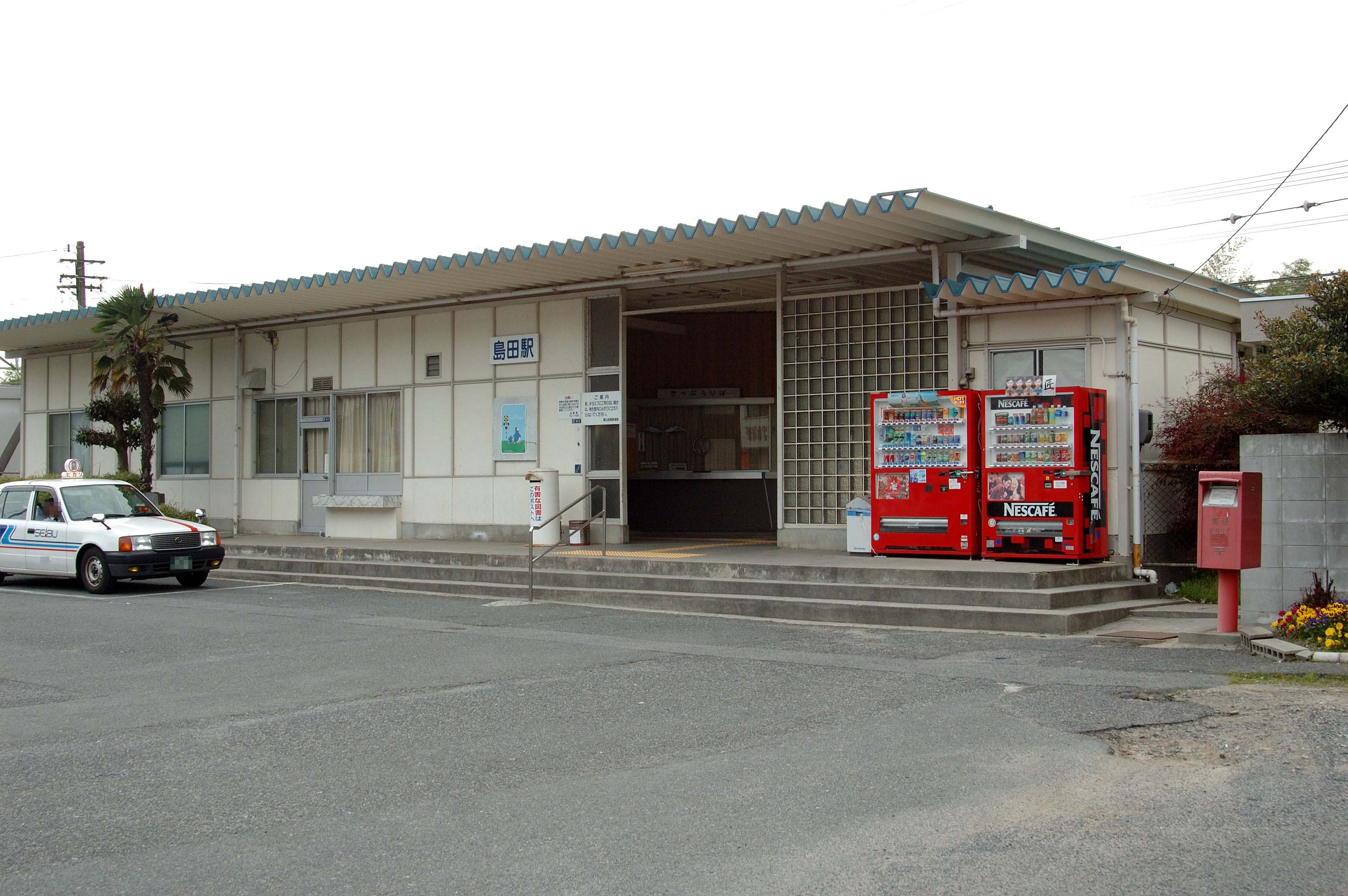 島田駅 駅舎 2006年4月 投稿者撮影